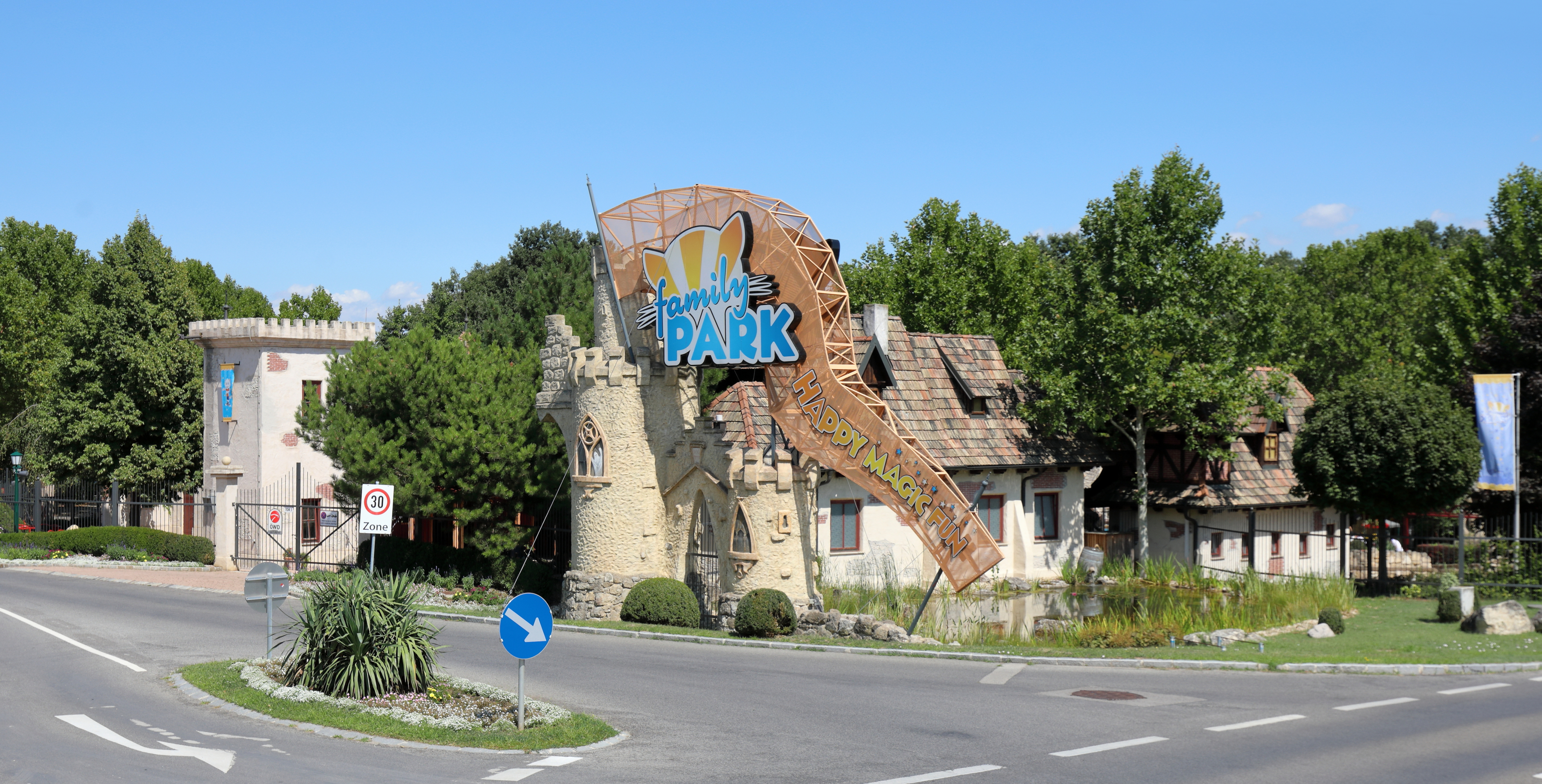 Der Familypark an der Landstraße B52 in der burgenländischen Marktgemeinde Sankt Margarethen im Burgenland und unmittelbar an der Gemeindegrenze zu Rust.Mit rund 145.000 m² Fläche ist er Österreichs größter Freizeit- und Familienpark. 1968 wurde der Park von der Familie Erwin Müller mit dem Namen „Märchenwald“ gegründet. Der Park wurde sukzessiv ausgebaut. 1999 erfolgte eine Umbenennung in „Märchenpark Neusiedlersee“ und 2010 in „Familypark“. 2018/19 wurde der Park an das französische Unternehmen Compagnie des Alpes, ein führenden europäischen Betreiber von Freizeitparks und Skiresorts, verkauft.